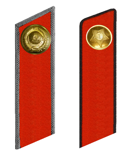 Петлица милиции